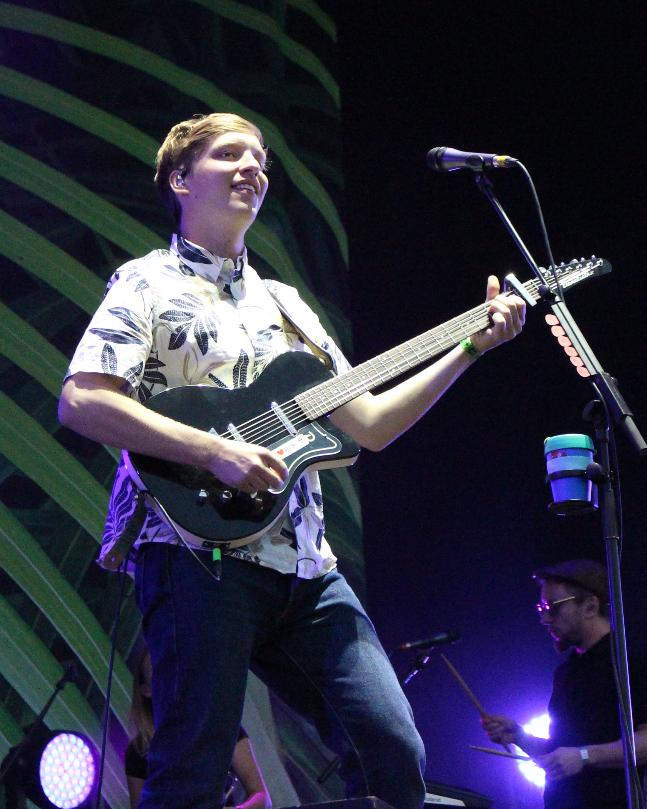 Festivalsommer This photo was created with the support of donations to Wikimedia Deutschland in the context of the CPB project "Festival Summer".